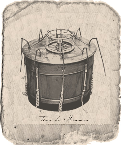 Bottich, Mesmer-Bottich